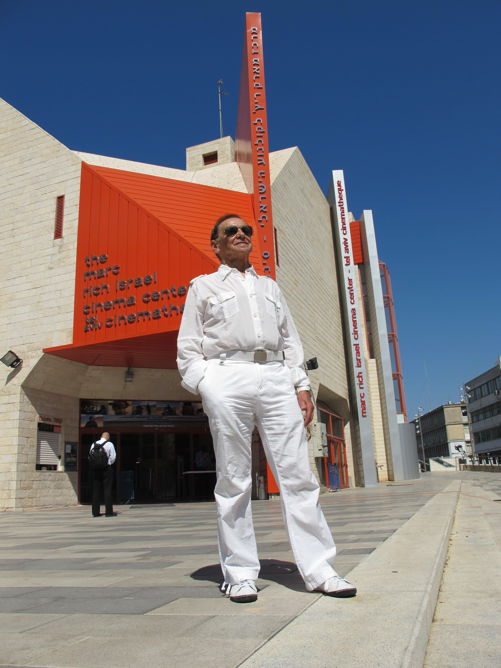 אדריכל he:סלו הרשמן בחזית בניין he:סינמטק תל אביב